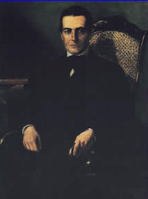 Portrait of José Gregorio Monagas.